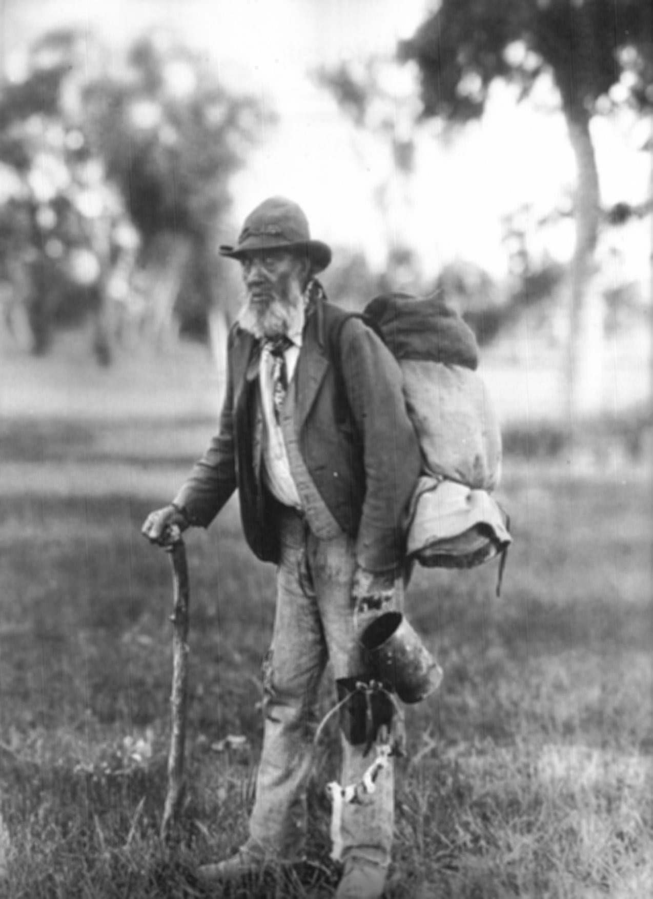 Elderly swagman.